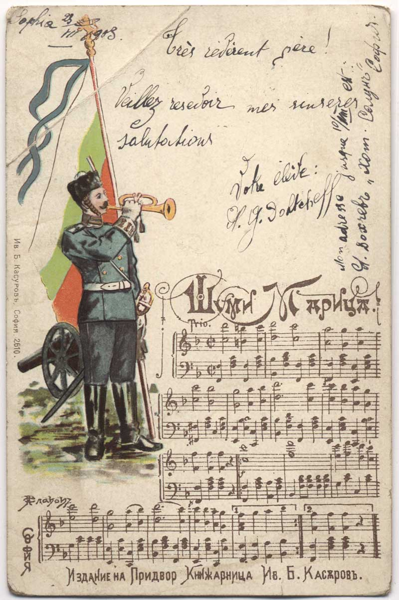 Картичка с петолиние на мелодията на българския химн „Шуми Марица“